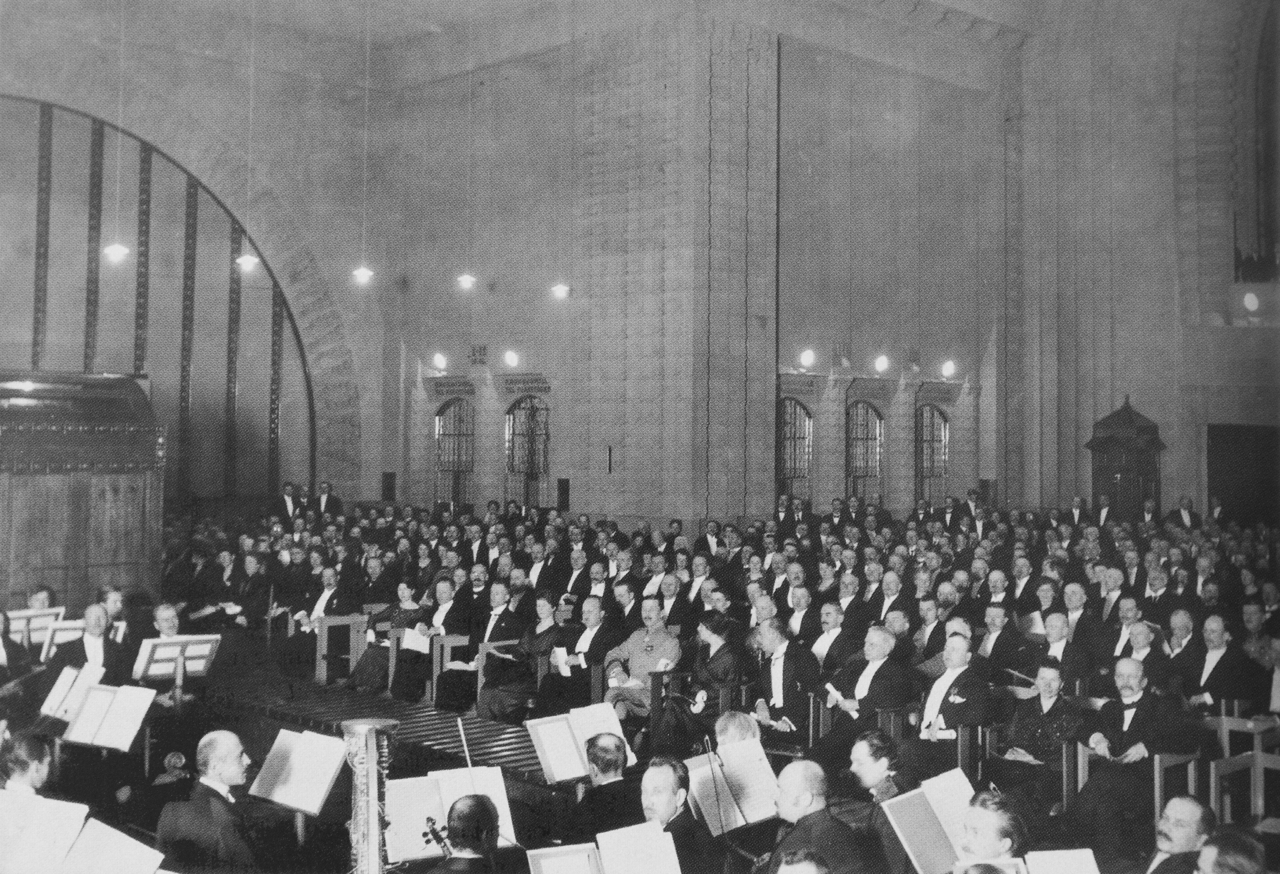 Helsingin rautatieaseman vihkiäistilaisuus. Ensimmäisessä rivissä keskellä istuu sotilasunivormussa valtionhoitaja Mannerheim, hänestä neljäs vasemmalle arkkitehti professori Eliel Saarinen puolisoineen.